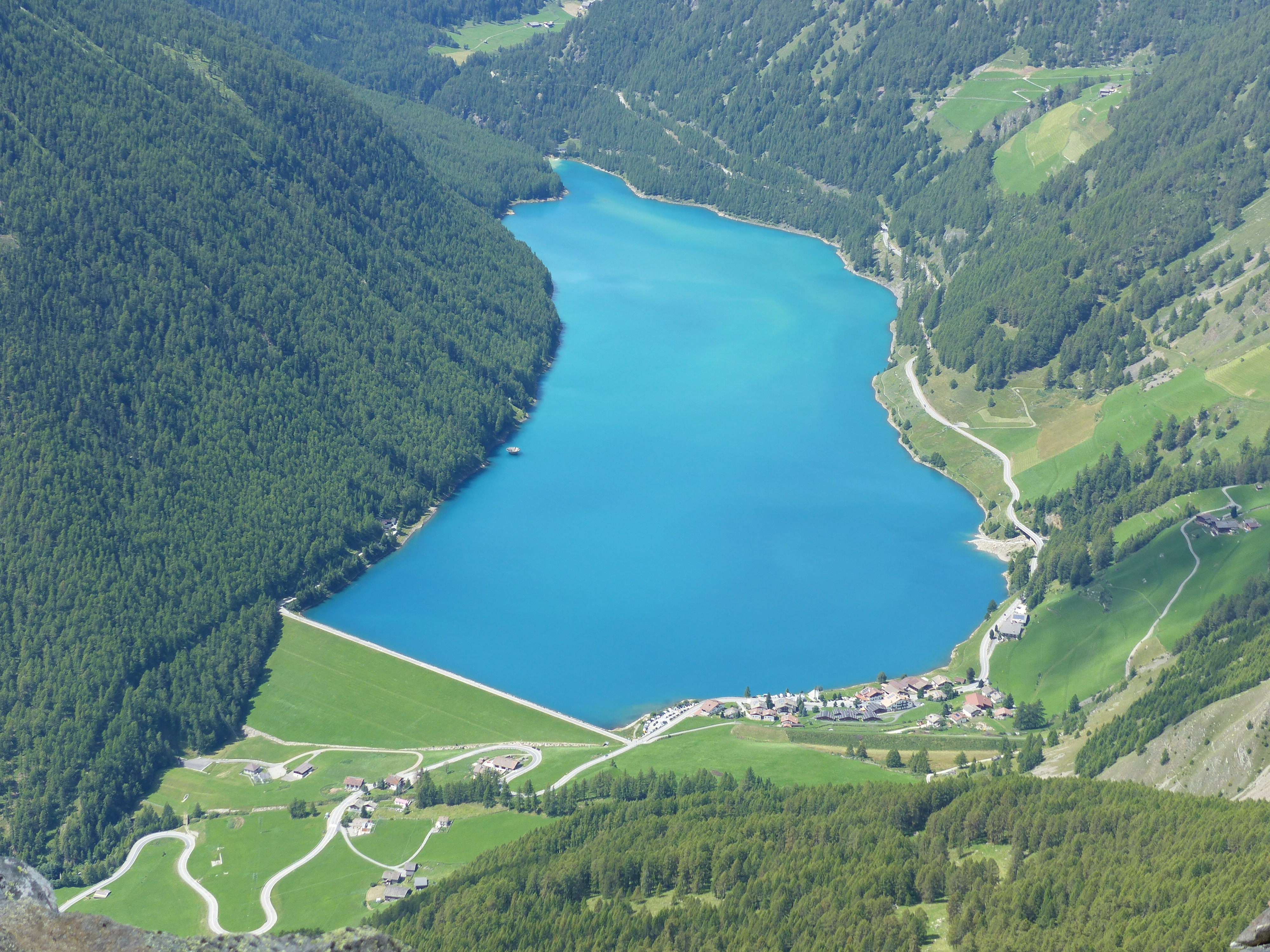 Blick von der Schröfwand auf den Vernagt-Stausee